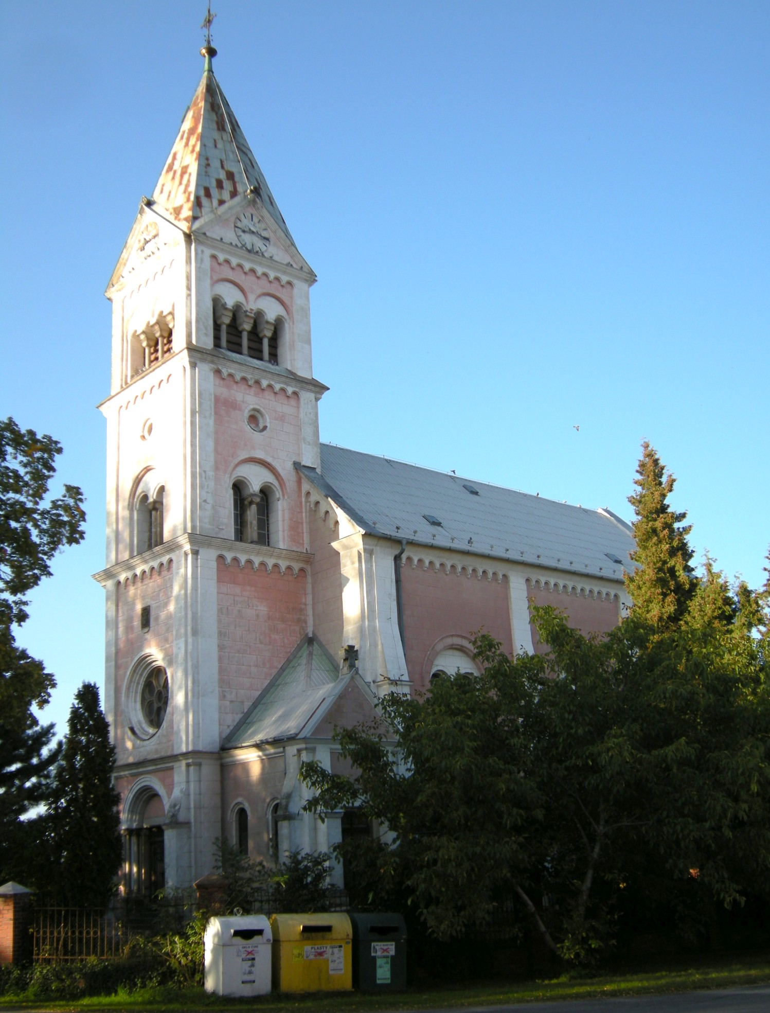 Die St. Laurentiuskirche in Bílý Potok bei Javorník in Tschechien.